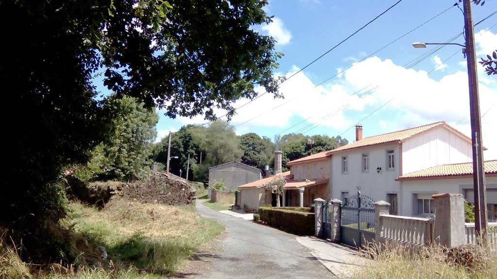 Vista de Martín, Curtis.